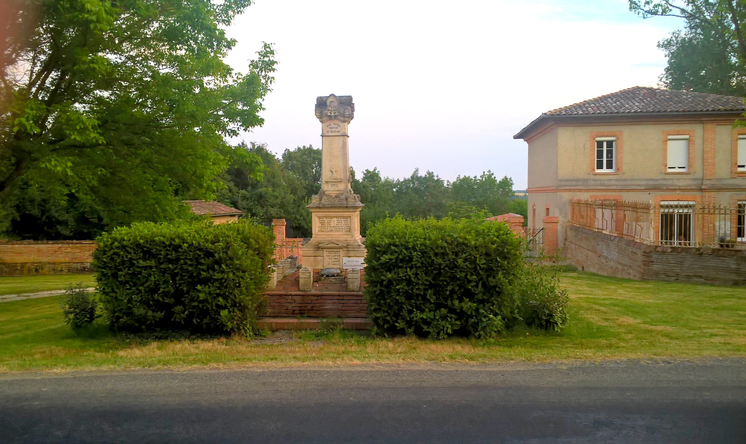 Le monument aux morts